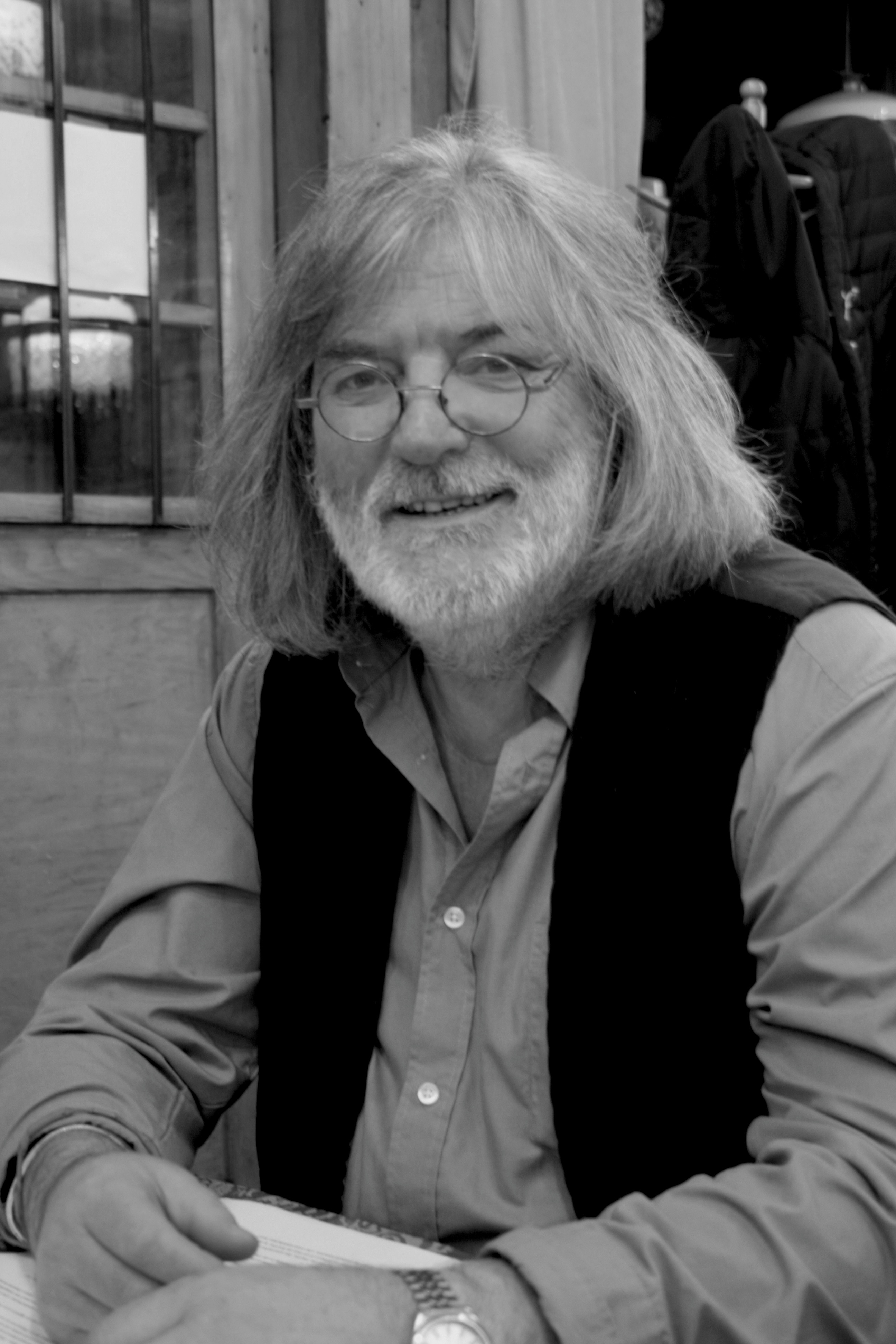 Roger Siffer chansonnier alsacien.